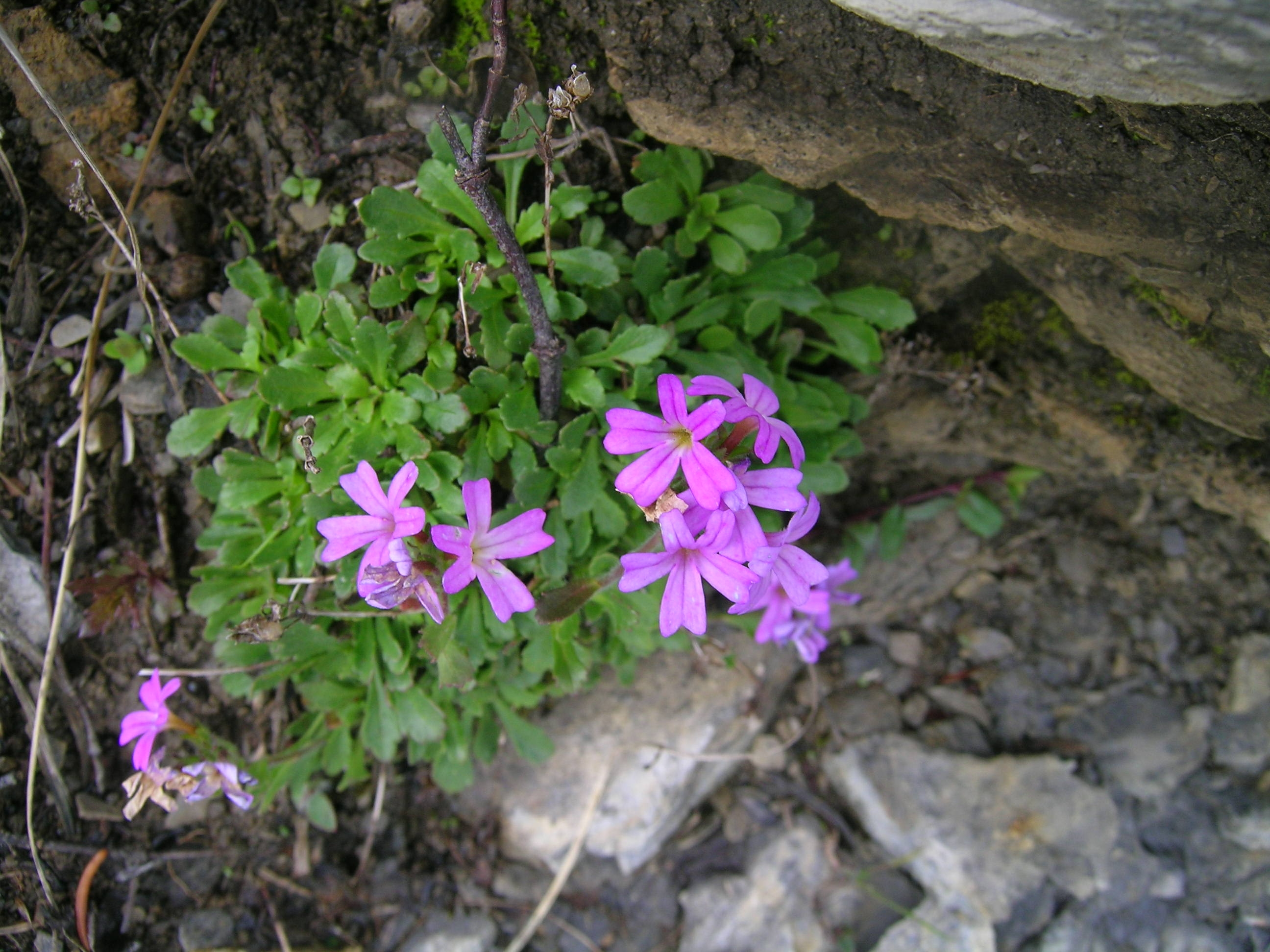 Leberbalsam (Erinus alpinus), Schynige Platte, Kanton Bern, Schweiz